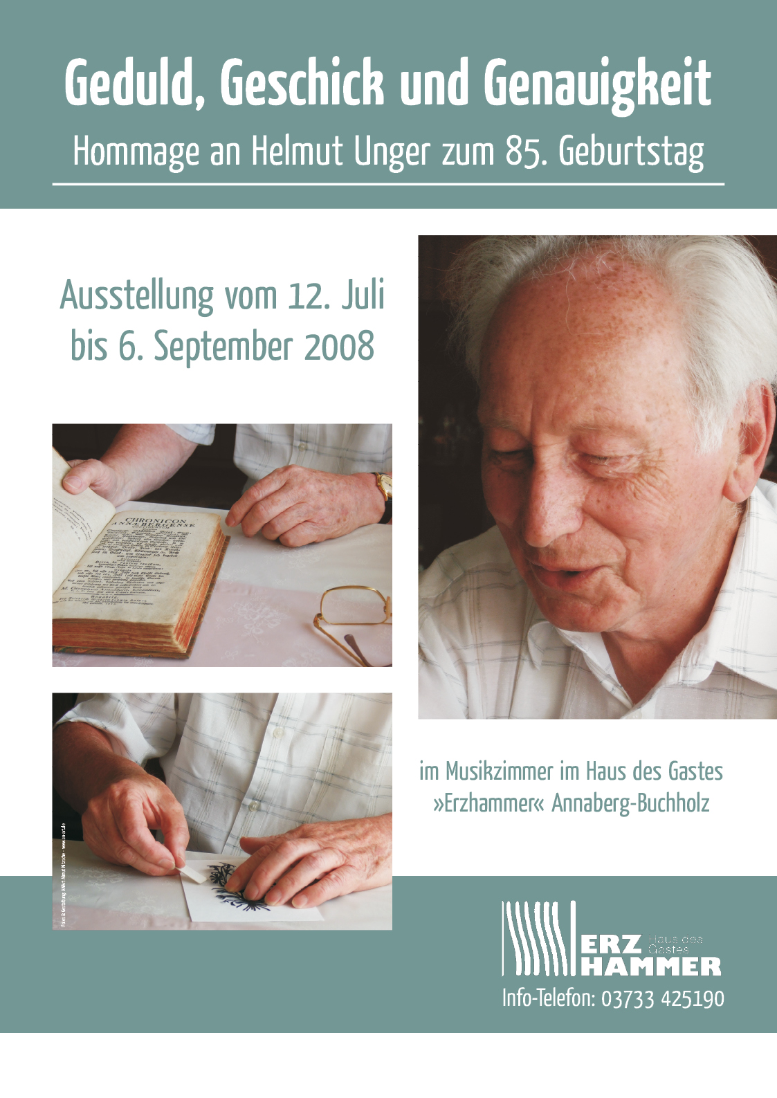 Plakat zur Ausstellung »Geduld, Geschick und Genauigkeit. Hommage an Helmut Unger zum 85. Geburtstag« (12. Juli bis 6. September 2008, Erzhammer Annaberg-Buchholz). Gestaltung und Fotos: ANArt Almut Nitzsche